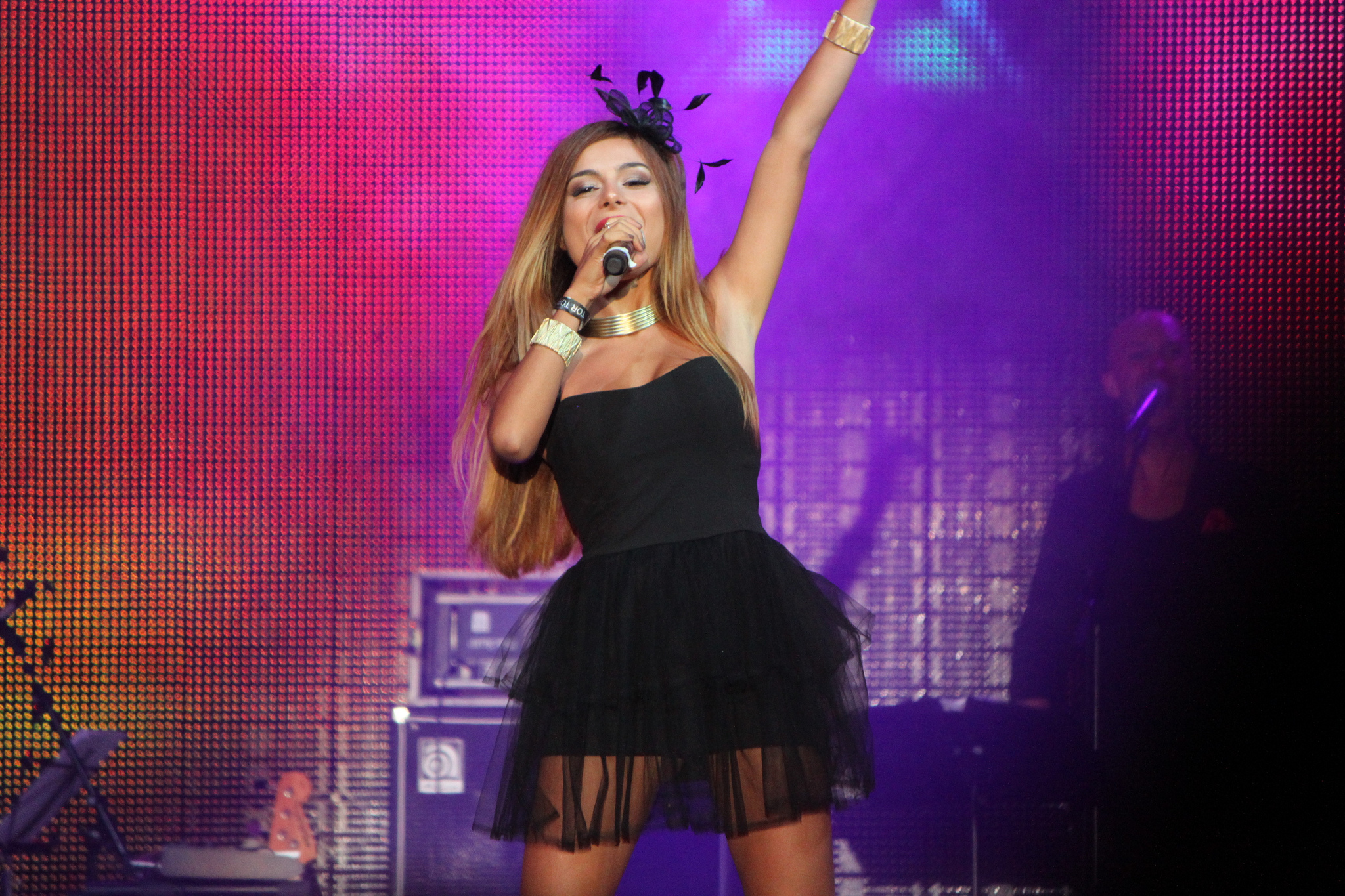 La cantante griega Eleftheria Eleftheriou en el Stockholm Pride 2012.